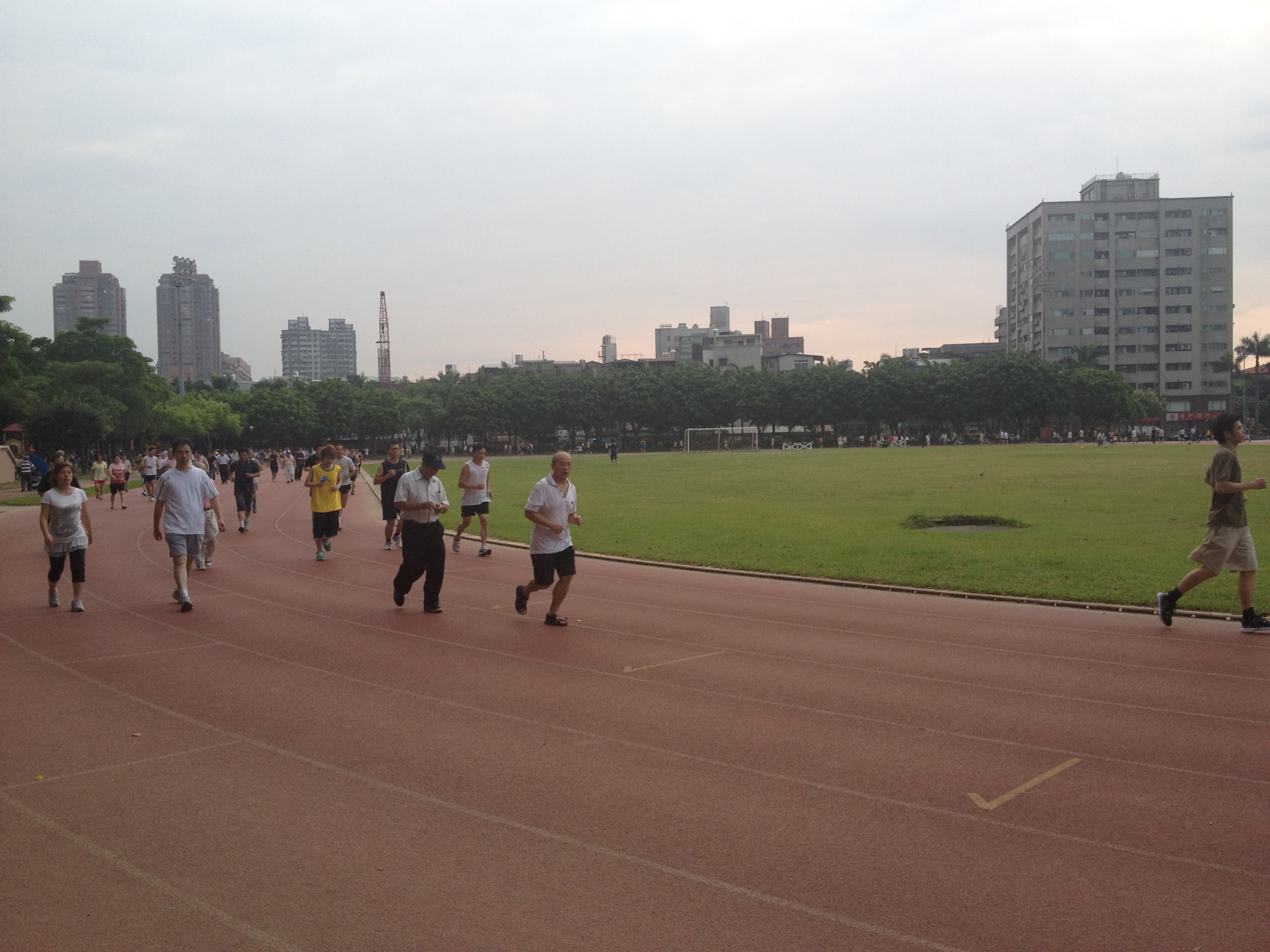 中文（台灣）: 新北市三重區綜合運動場PU跑道。